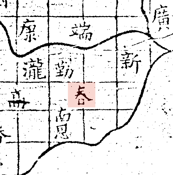 粵語: 禹跡圖中嘅春州